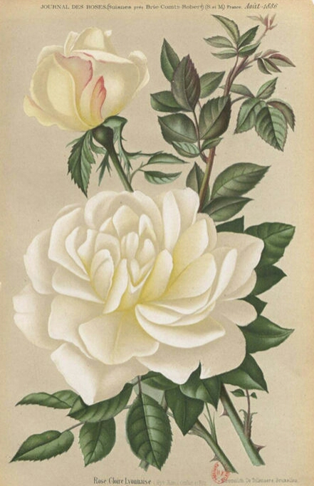 Rose 'Gloire Lyonnaise' (Guillot fils, 1884), in Journal des roses, août 1886.